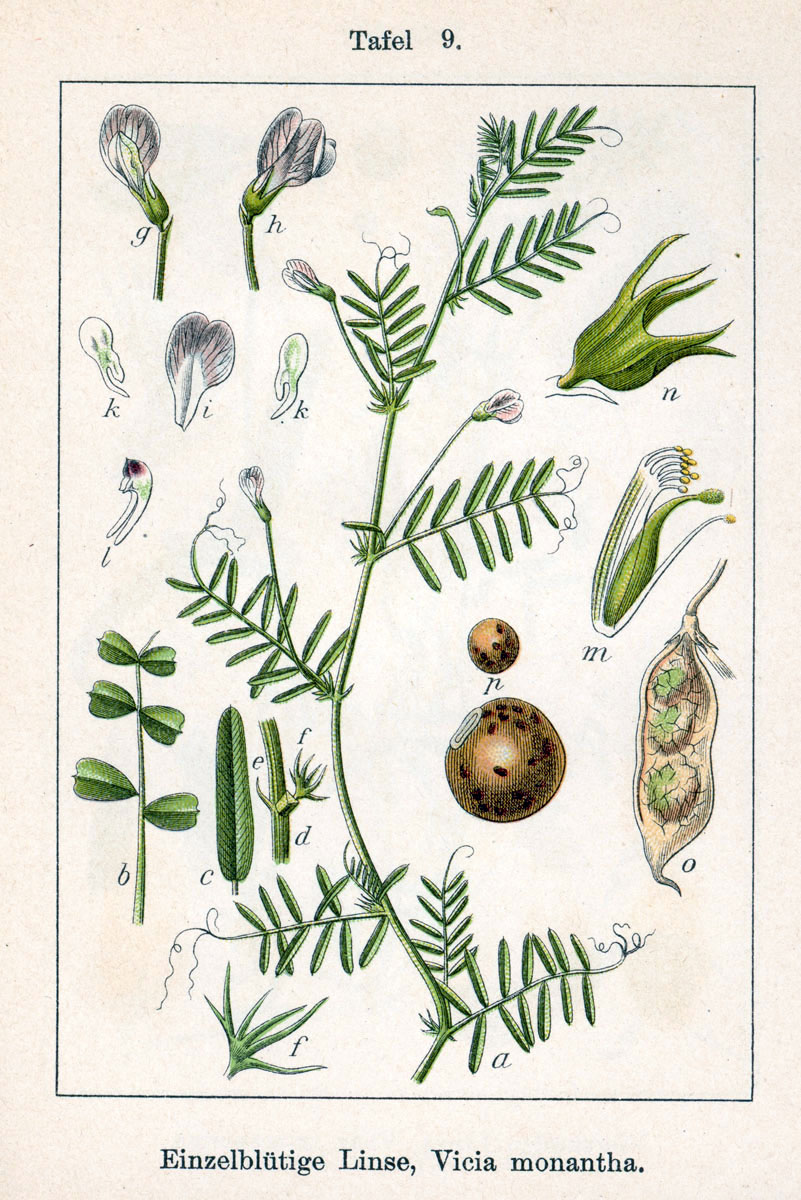 Vicia monantha Retz. Original Description Einzelblütige Linse, Vicia monantha